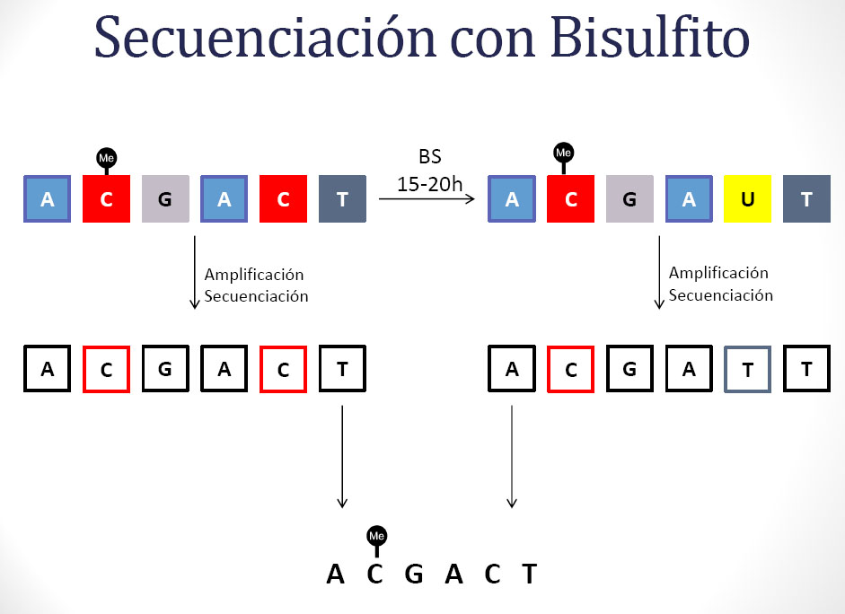 Secuenciación de ADN mediante la técnica del bisulfito para la detección de citosinas metiladas